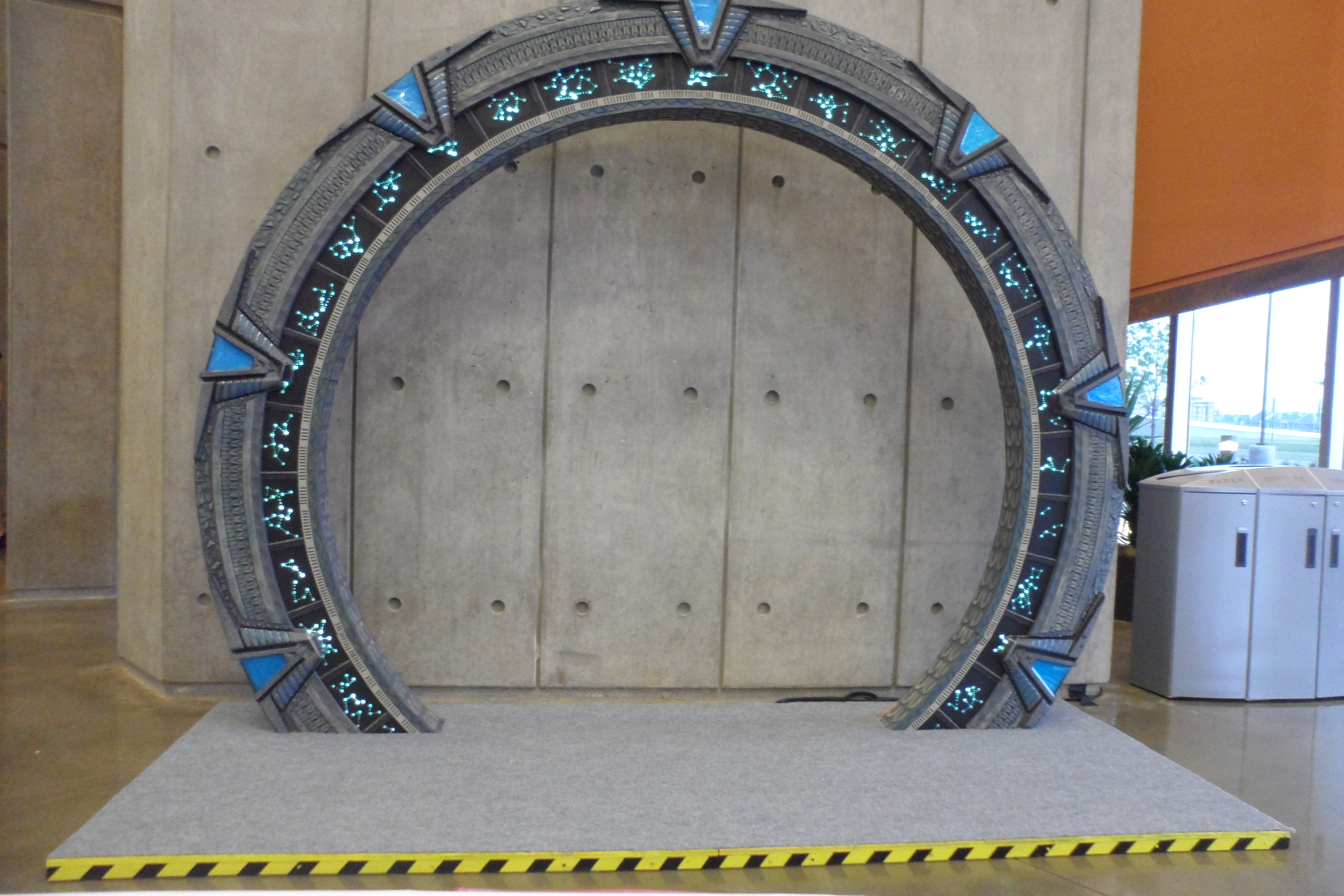 Maquette de la porte des étoiles de la série télivisée Stargate Atlantis à l'échelle 43%